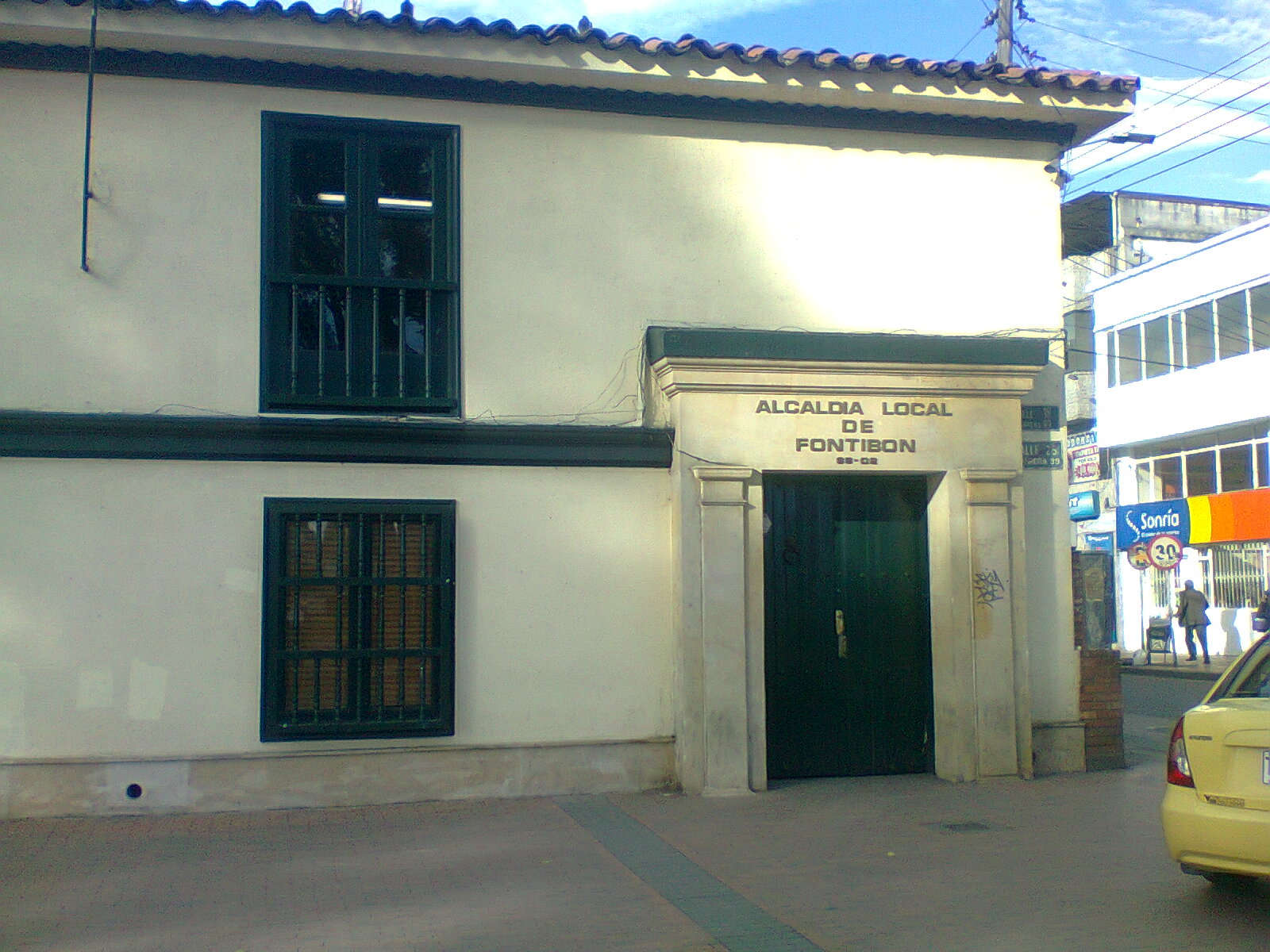 sedehckfkfk